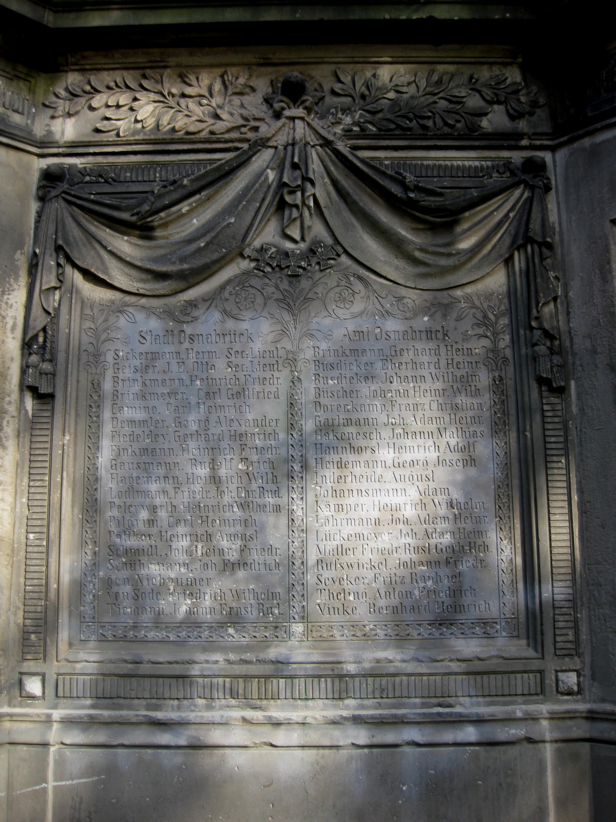 Tafel mit Namen der im deutsch-französischen Krieg 1870/1871 Gefallenen der Stadt und des Amtes Osnabrück am Ehrenmal auf dem Straßburger Platz in Osnabrück